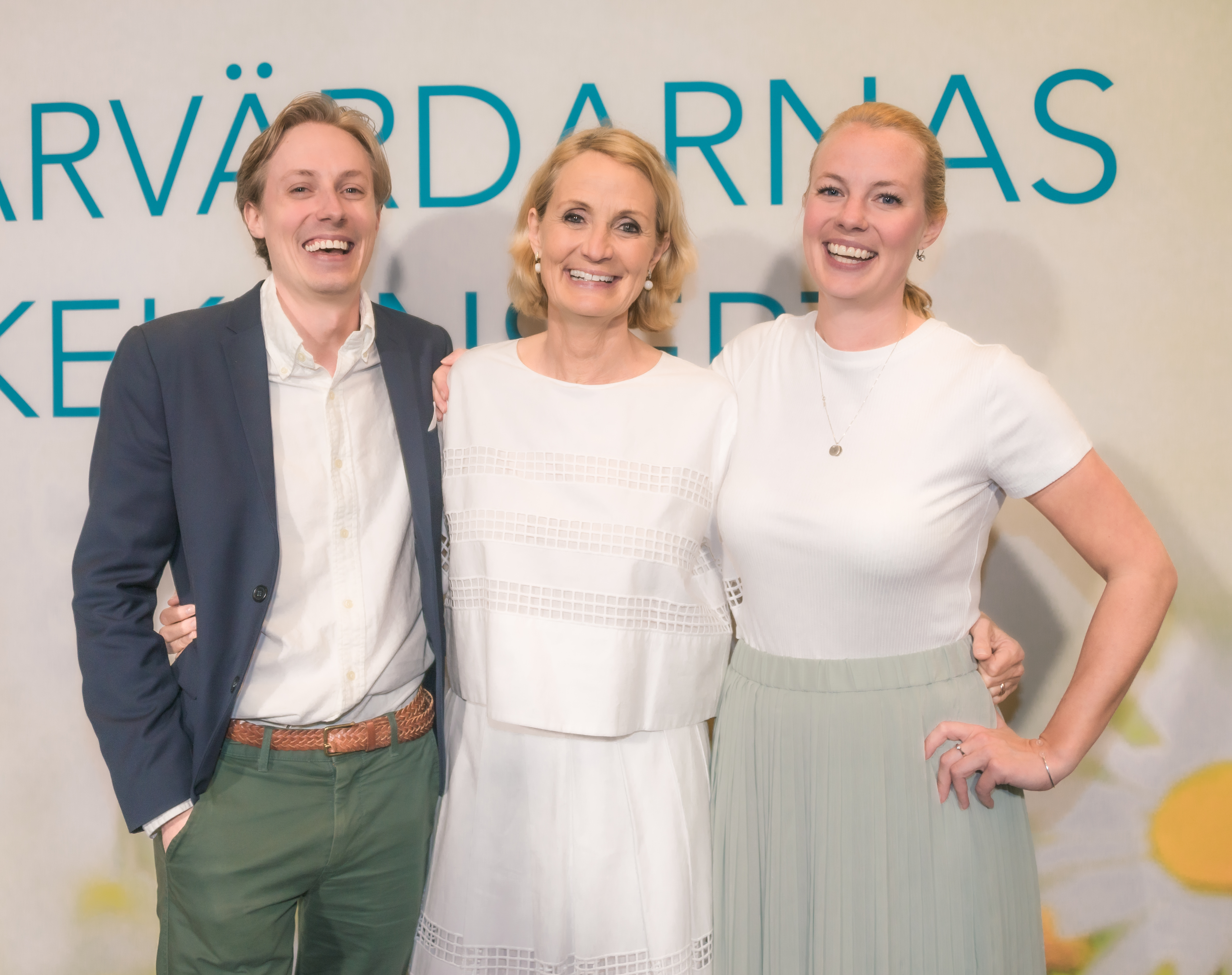 Bibi Rödöö (mitten) på röda mattan på väg in i Berwaldhallen den 13 juni 2019.